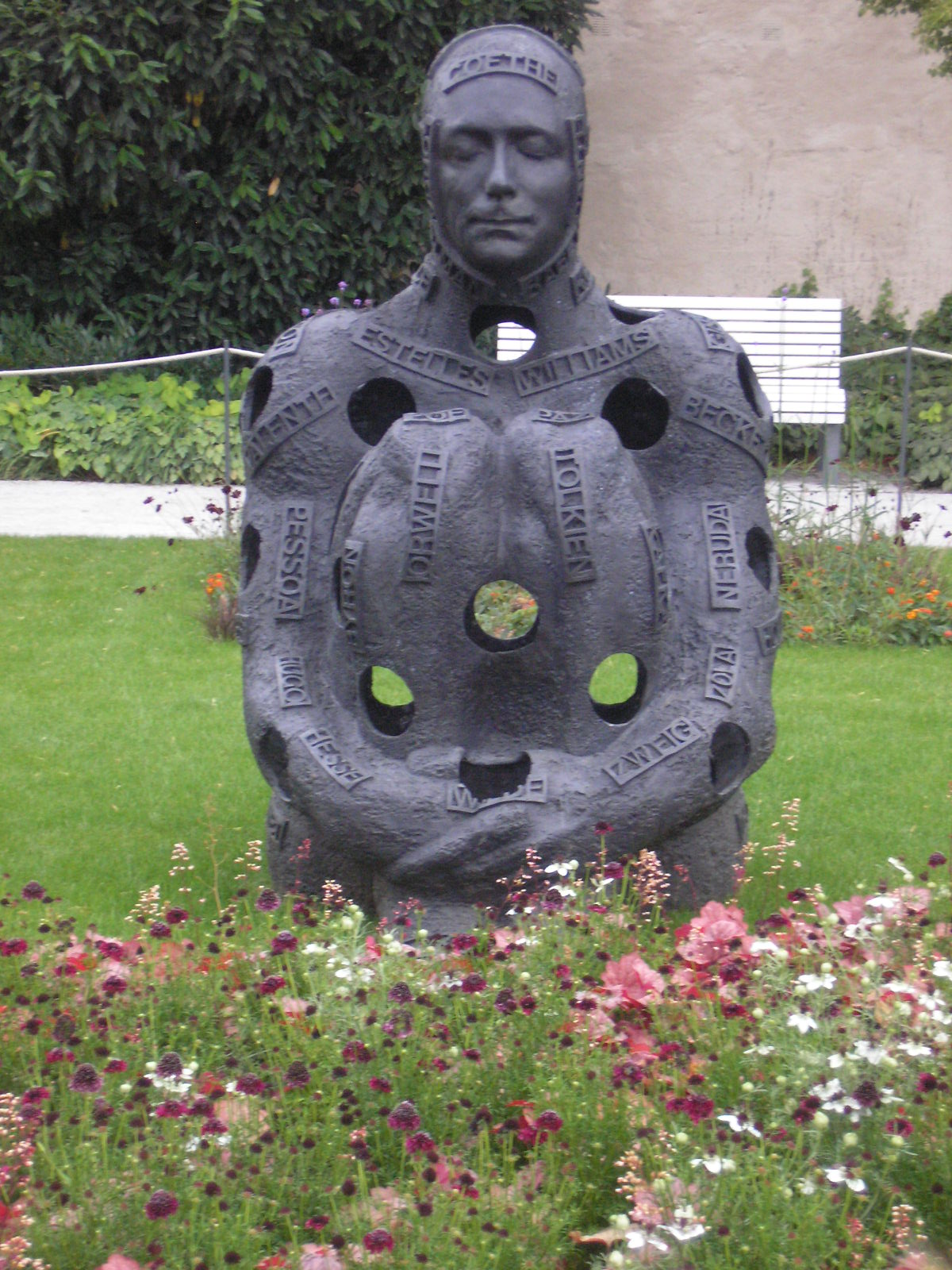 Skulptur Alchemy von Jaume Plensa 2006, Buga 2011 Koblenz, Leihgabe Galerie Scheffel, Bad Homburg, Größe:205x158x120